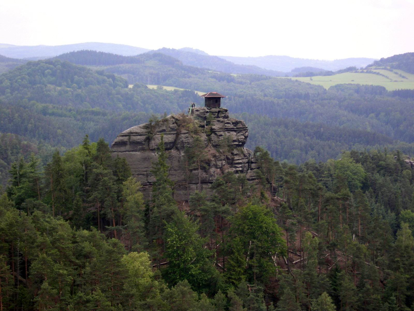 Marienfels Böhmische Schweiz von Thomas Schaffhirt